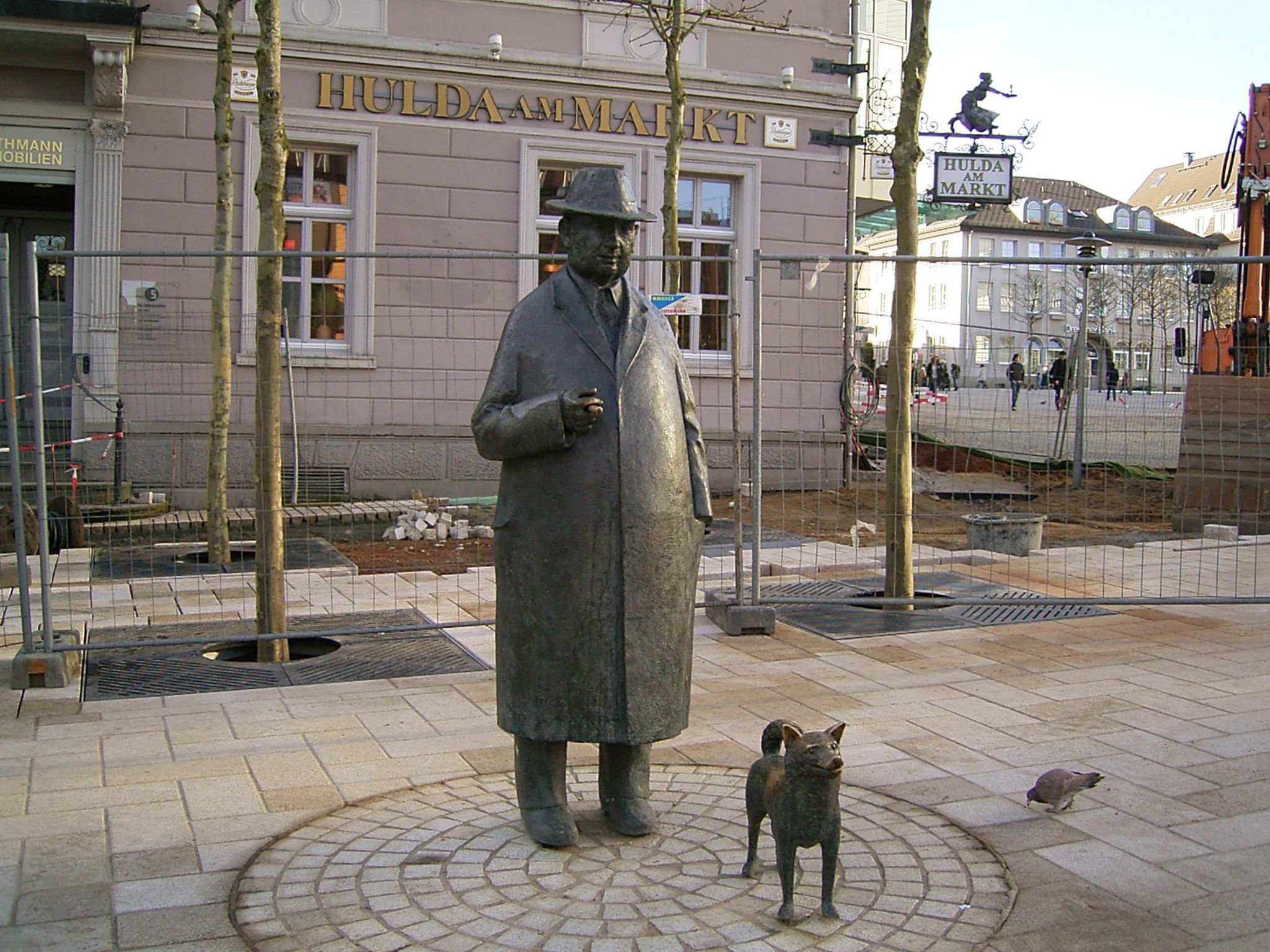 Lüdenscheid